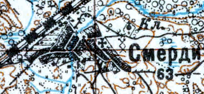 Топографическая карта Ленинградской области, квадрат VIc-28 (Луга), деревня Смерди